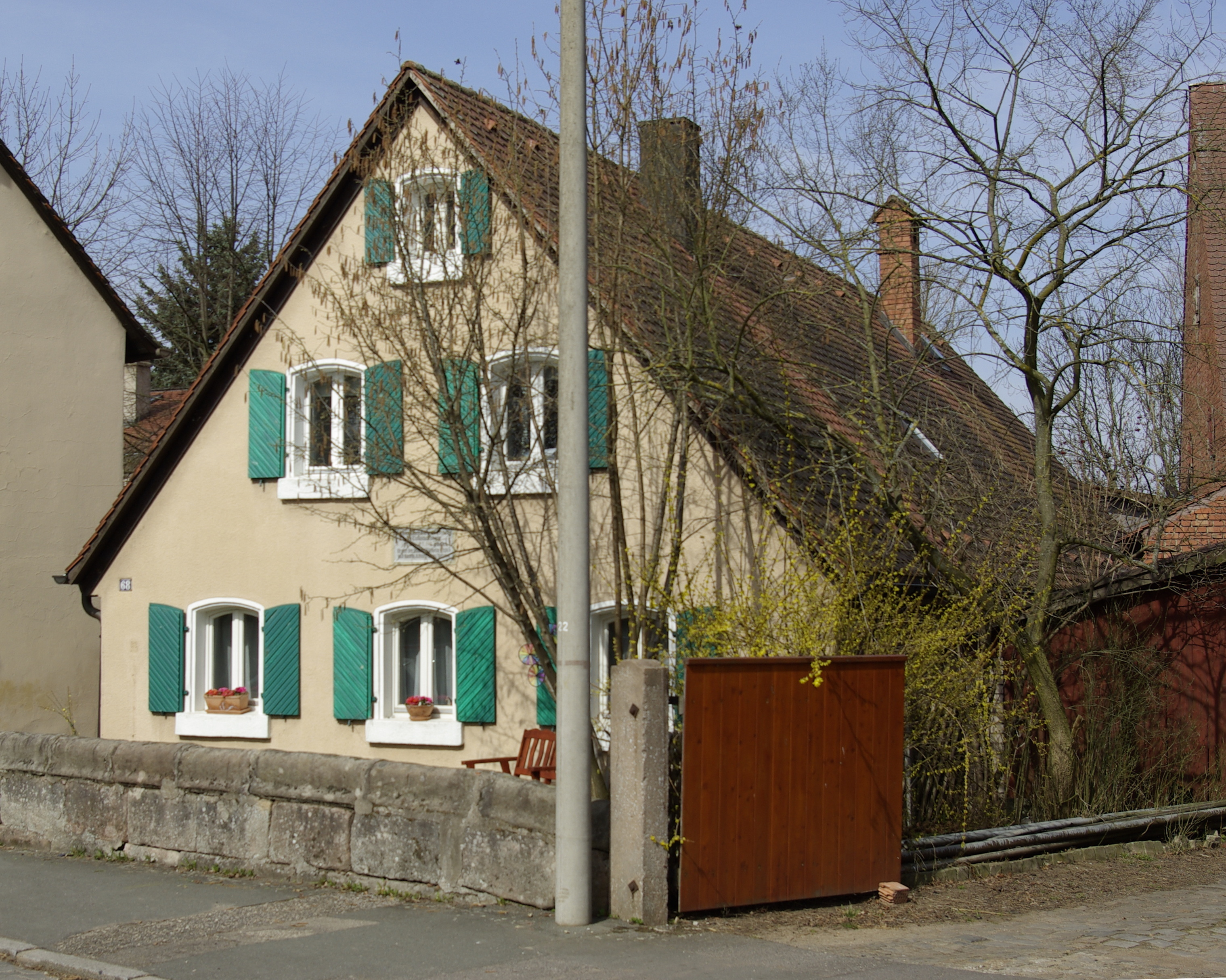 Bucher Hauptstraße 68, Geburtshaus des Malers Johann Sperl, im Nürnberger Stadtteil Buch.